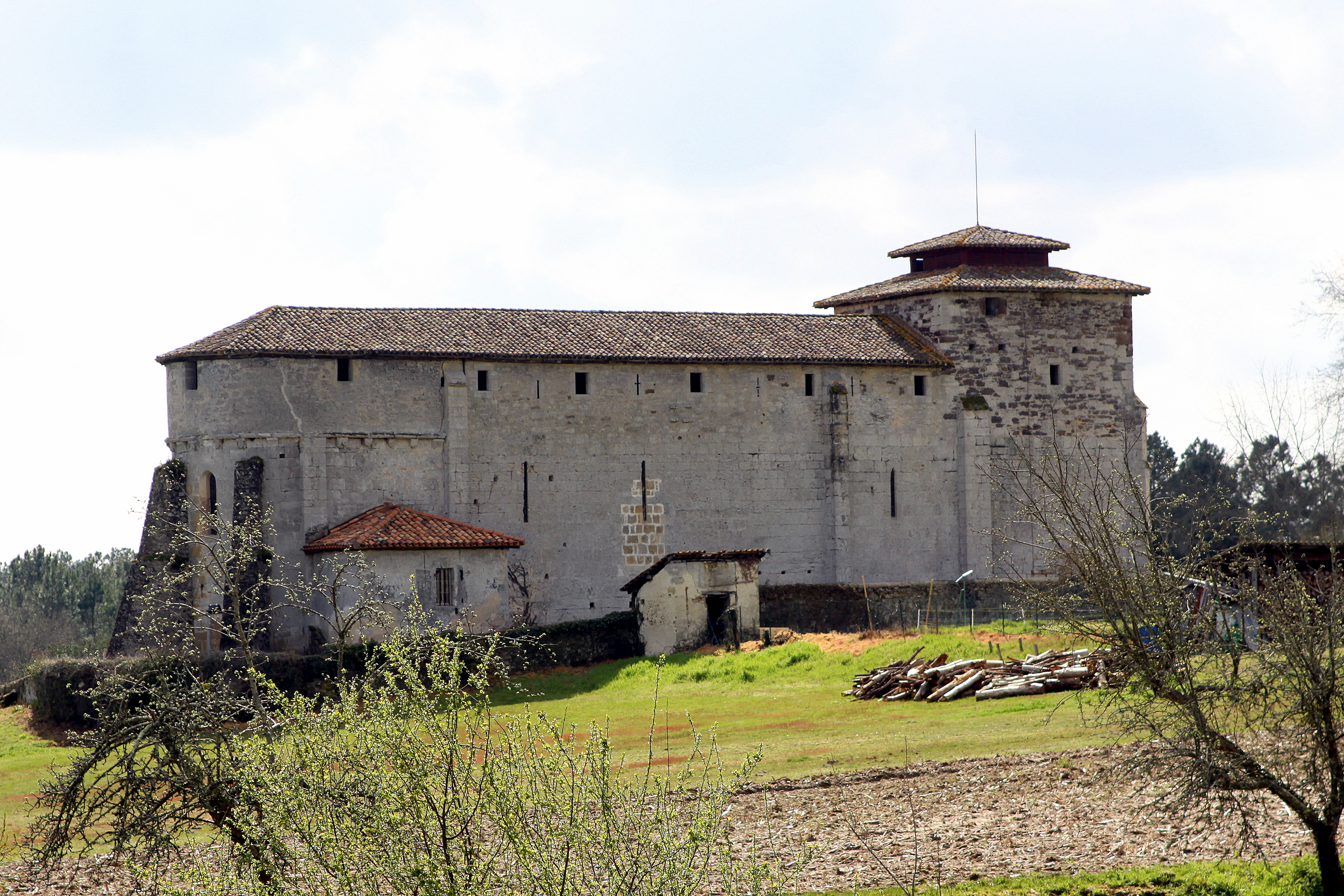 Romanesch Kierch vu Lesgor Nordfaçade